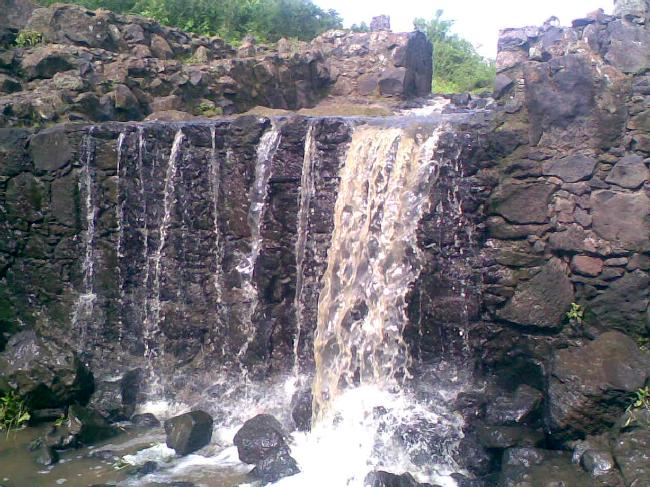 Los Chorros Lugar turistico y mas visitado en Monteleon